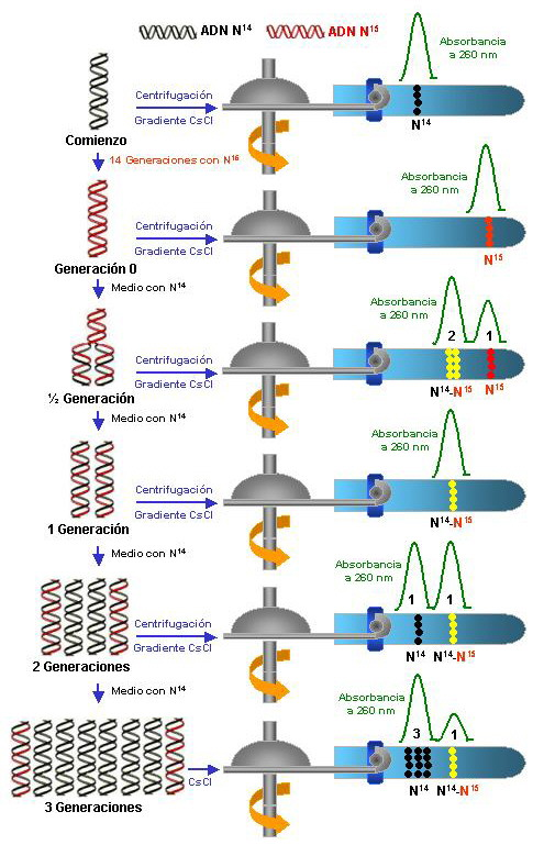 experimentos de meselson-stahl: evidencias experimentales de que la replicación es semiconservativa